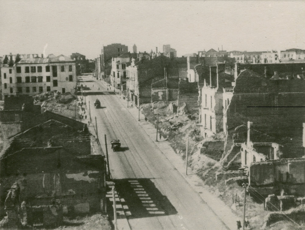 Вызваленне Мінска. Вуліца Савецкая (праспект Незалежнасці).